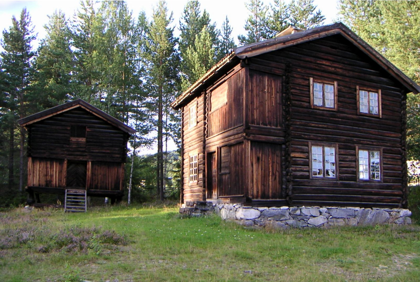 Stue fra Søndre Halmrast, Søndre Land (ca 1700) Stabbur fra Brone, Nordsinni, Nordre Land (ca 1700)